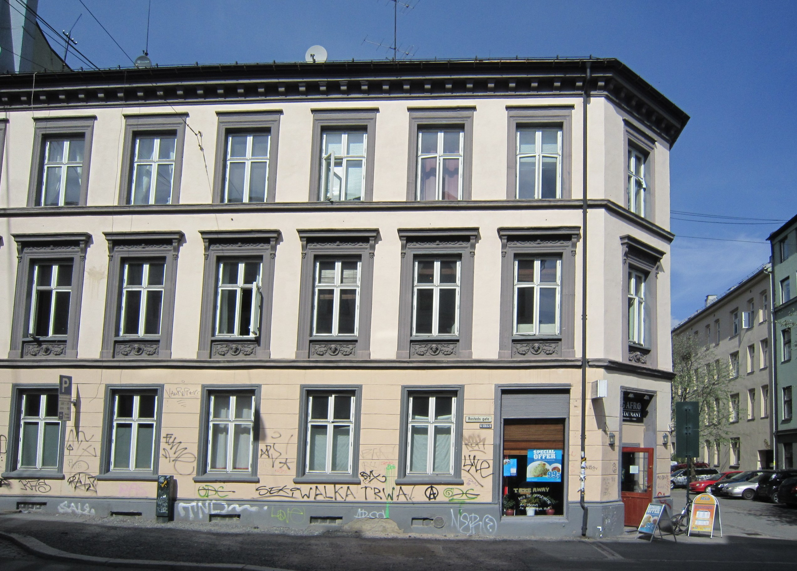 Rosteds gate i Oslo